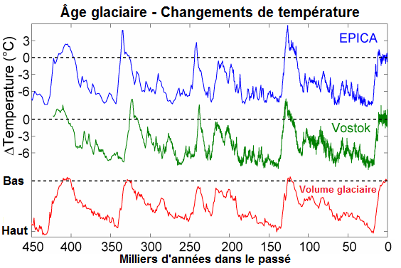 Variations des températures en Antarctique lors des derniers cycles glaciaires/interglaciaires, et comparaison avec l'évolution du volume des glaces mondiale (L'époque contemporaine est à droite du graphique). Rappel : les changements de température sur un site équatorial typique auraient été nettement moindres que les changements observés à haute latitude et en zone polaire